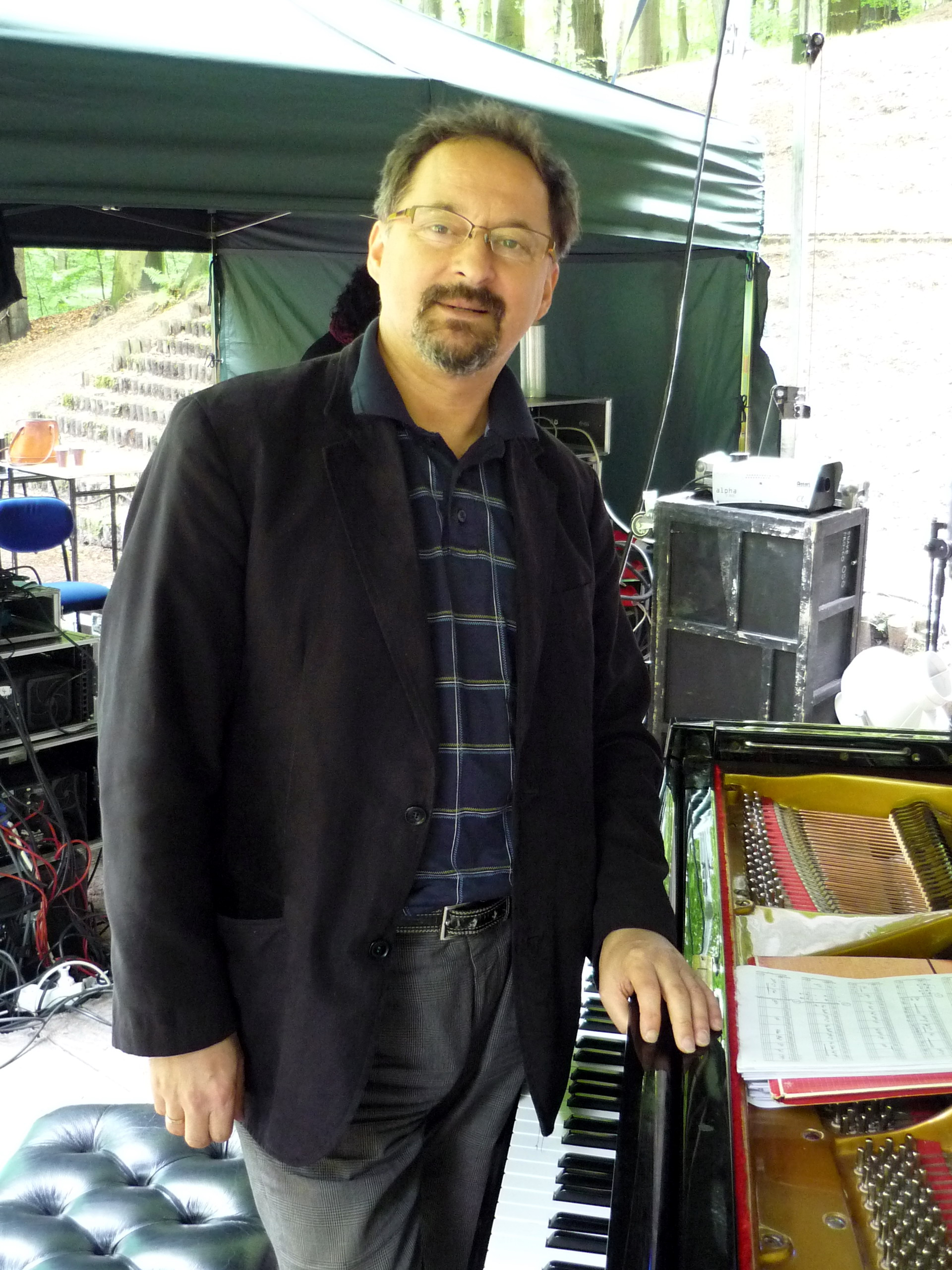 Wojciech Niedziela, Gdańsk 2011